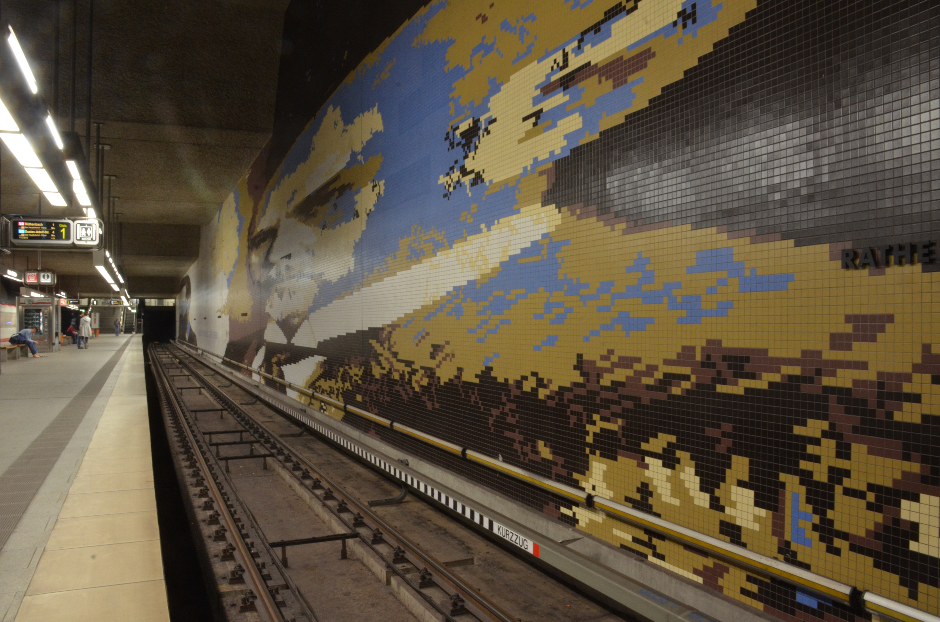 Nürnberg, U-Bahnstation Rathenauplatz, 10. Wikipedia-Fotoworkshop. Künstlerische Gestaltung des Großmosaiks 1990 von Gregor Hiltner (zeigt Walther Rathenau)